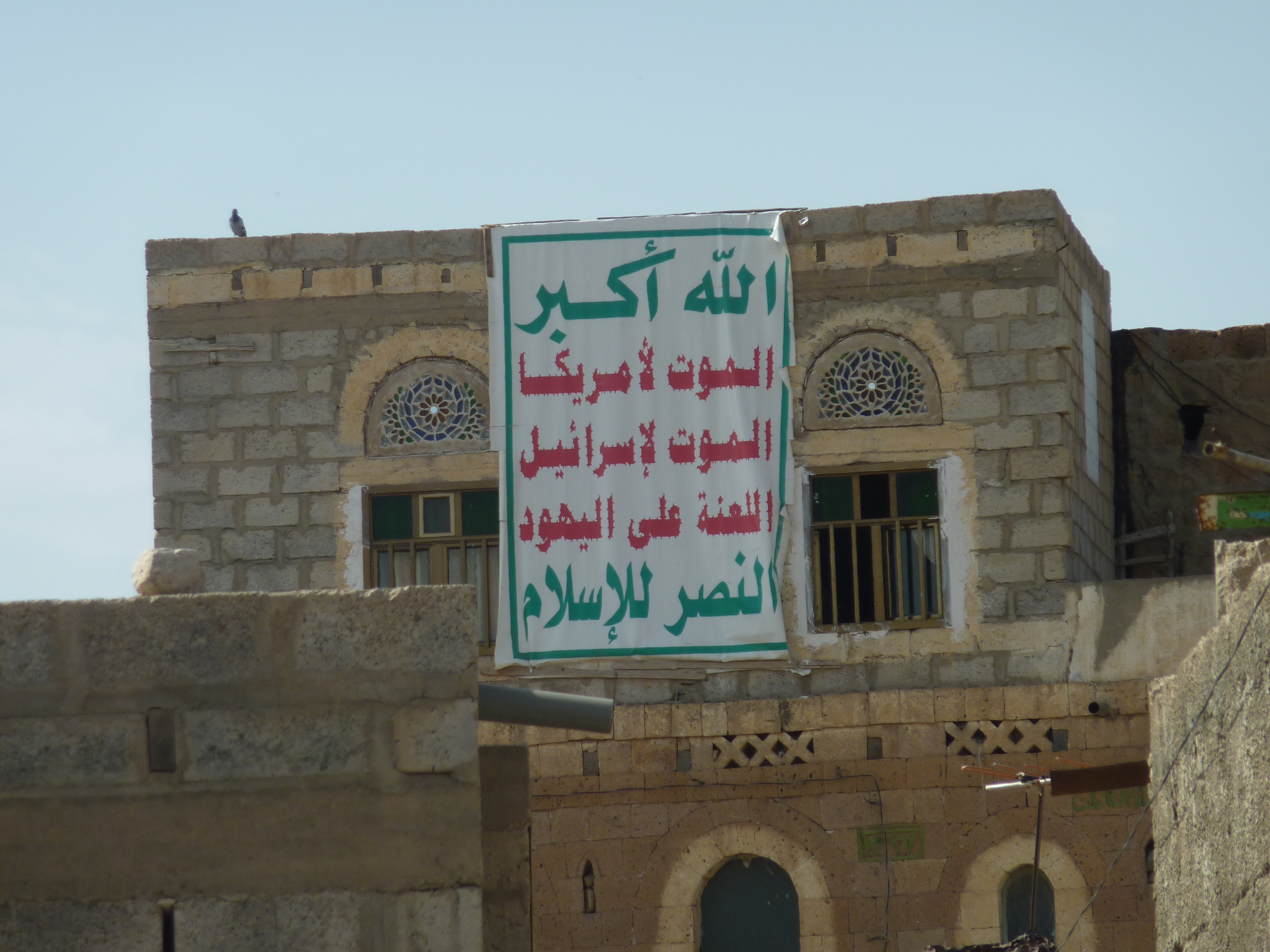 Parole der Huthis an einem Haus in Yafaa- Dhamar-Jemen.